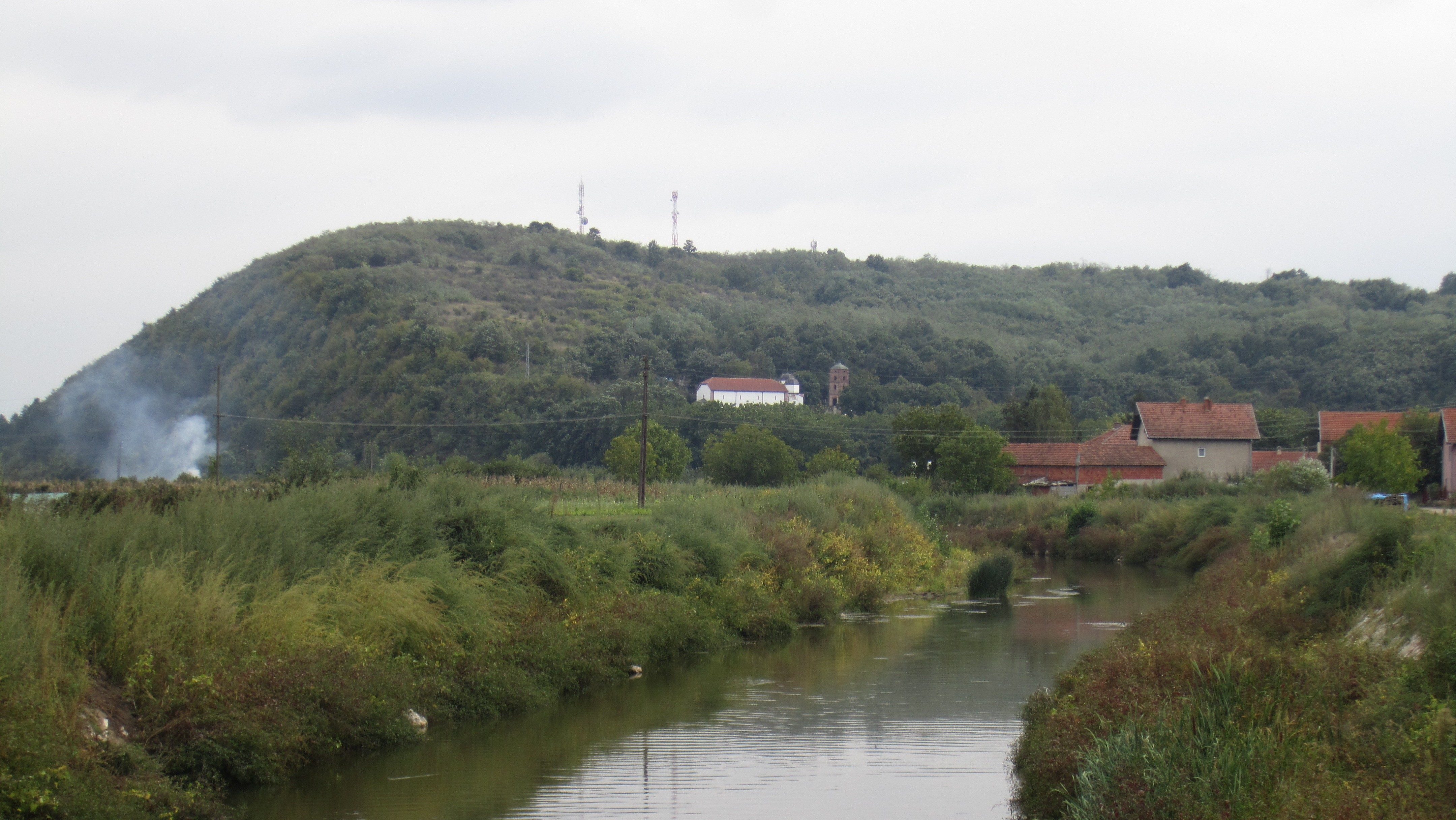 Srpski (latinica): Pečenjevce, Leskovac